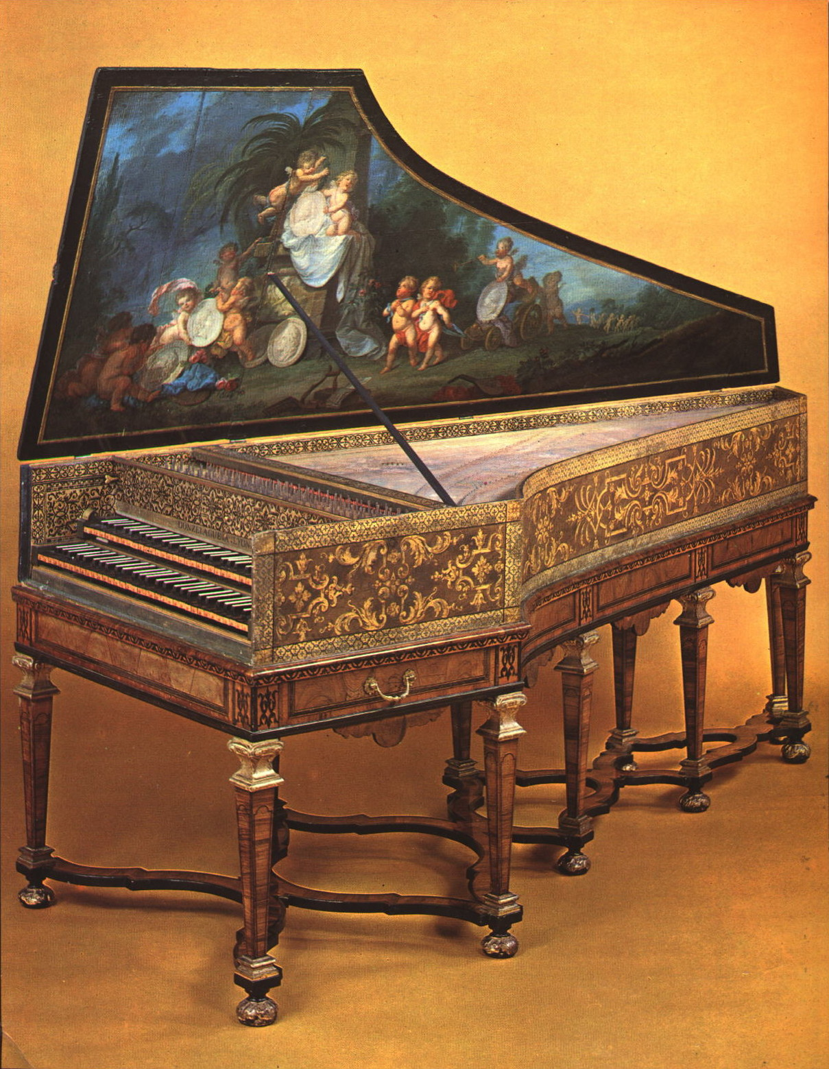 Clavecin DONZELAGUE (1716)- Piètement royal - 2 grands claviers 61 notes, en position de concert. Acheté par souscription publique par la Ville de Lyon en septembre 1977.